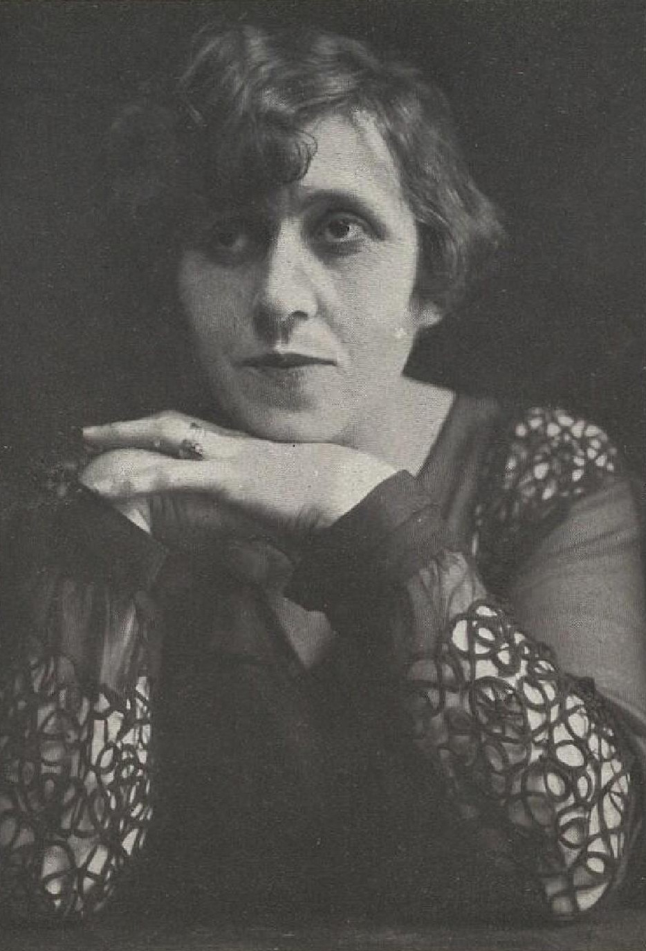 Otýlie Beníšková (1882-1967), česká herečka